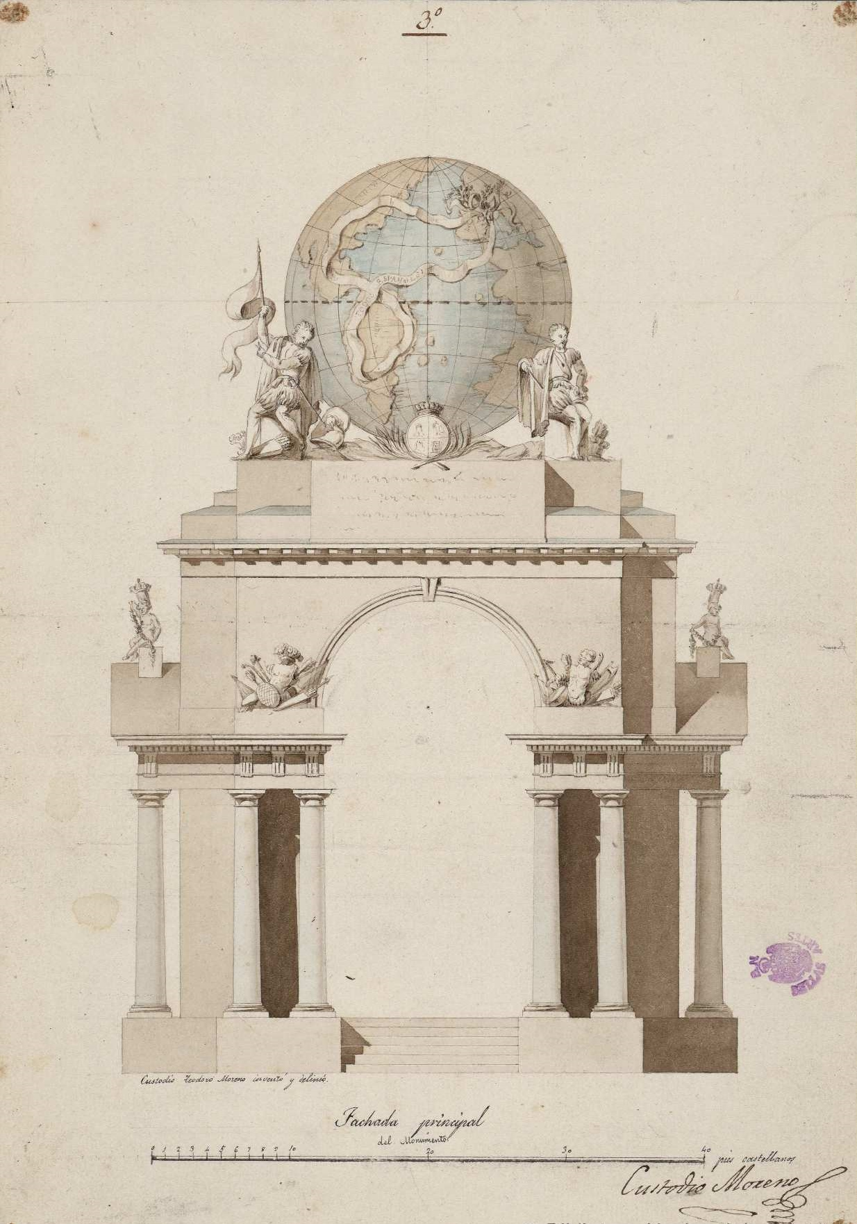 Fachada principal del monumento erigido a la memoria de los conquistadores del Nuevo Mundo, ornatos de la fuente de la Puerta del Sol para la entrada en Madrid de la reina María Cristina de Borbón y su enlace con Fernando VII, dibujo a pluma, tinta y aguadas. Firmado Custodio Moreno. Biblioteca Nacional de España.